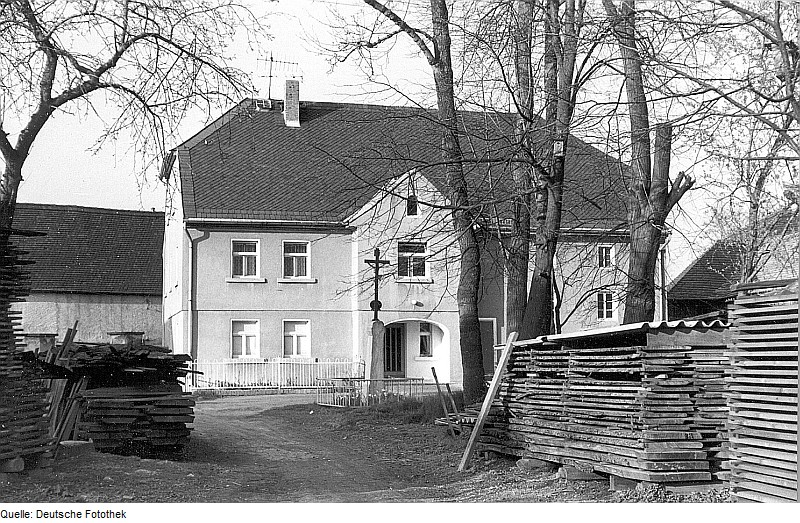 Original image description from the Deutsche Fotothek Ralbitz-Rosenthal-Zerna. Ehem. Wassermühle